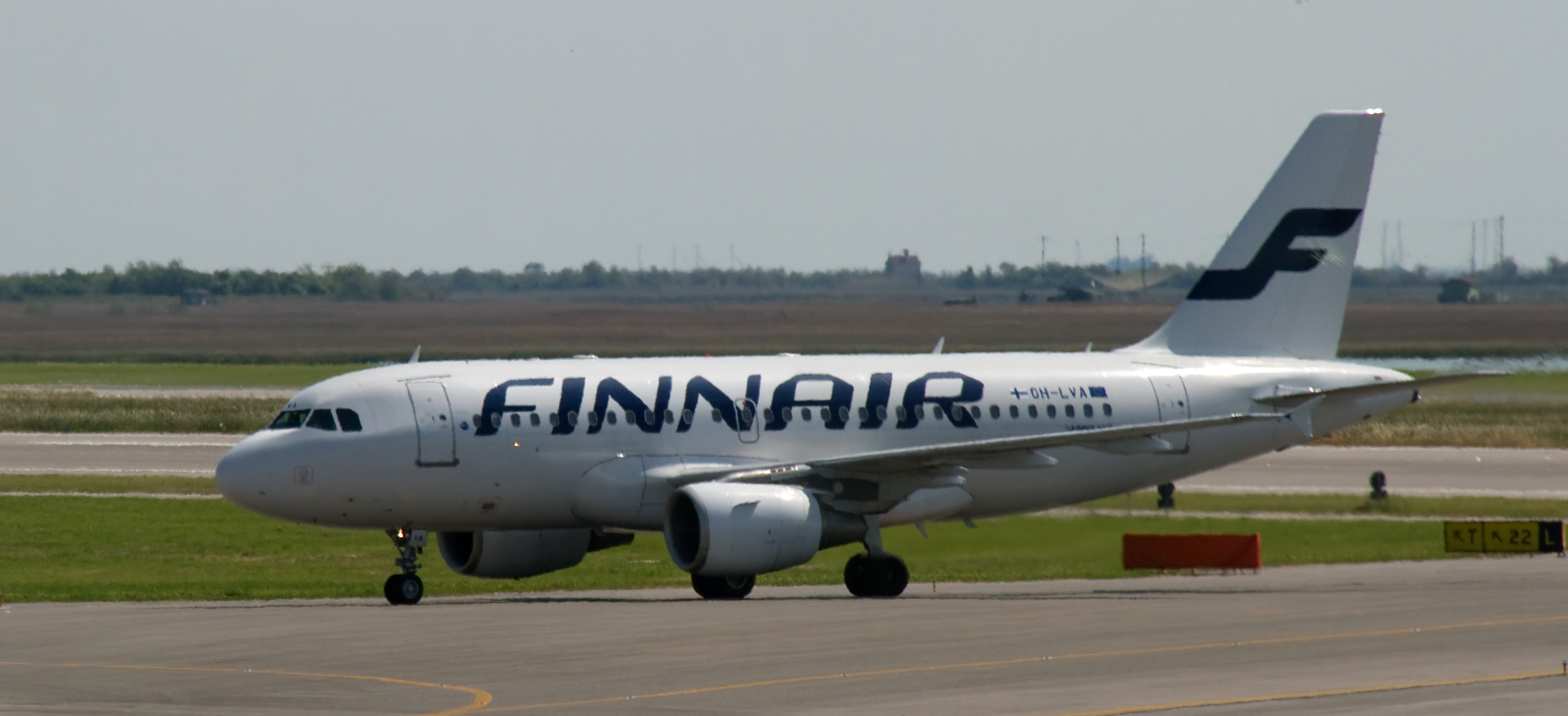 Finnair OH-LVA 2